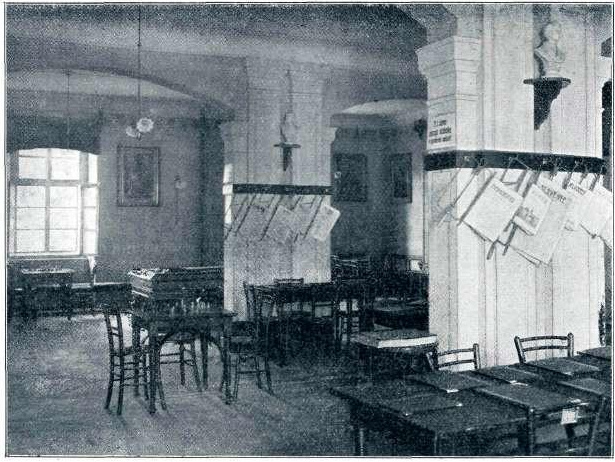 Ljudski dom v Ljubljani, čitalnica.